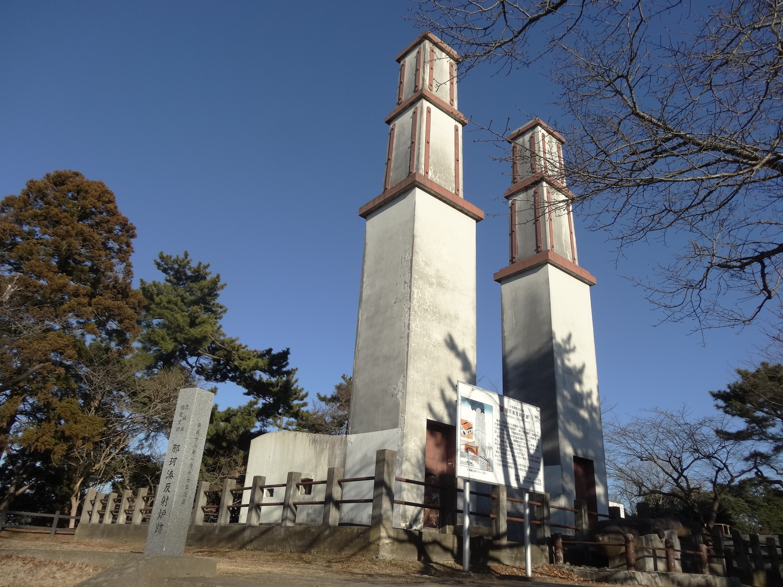 ひたちなか市にある反射炉（復元）